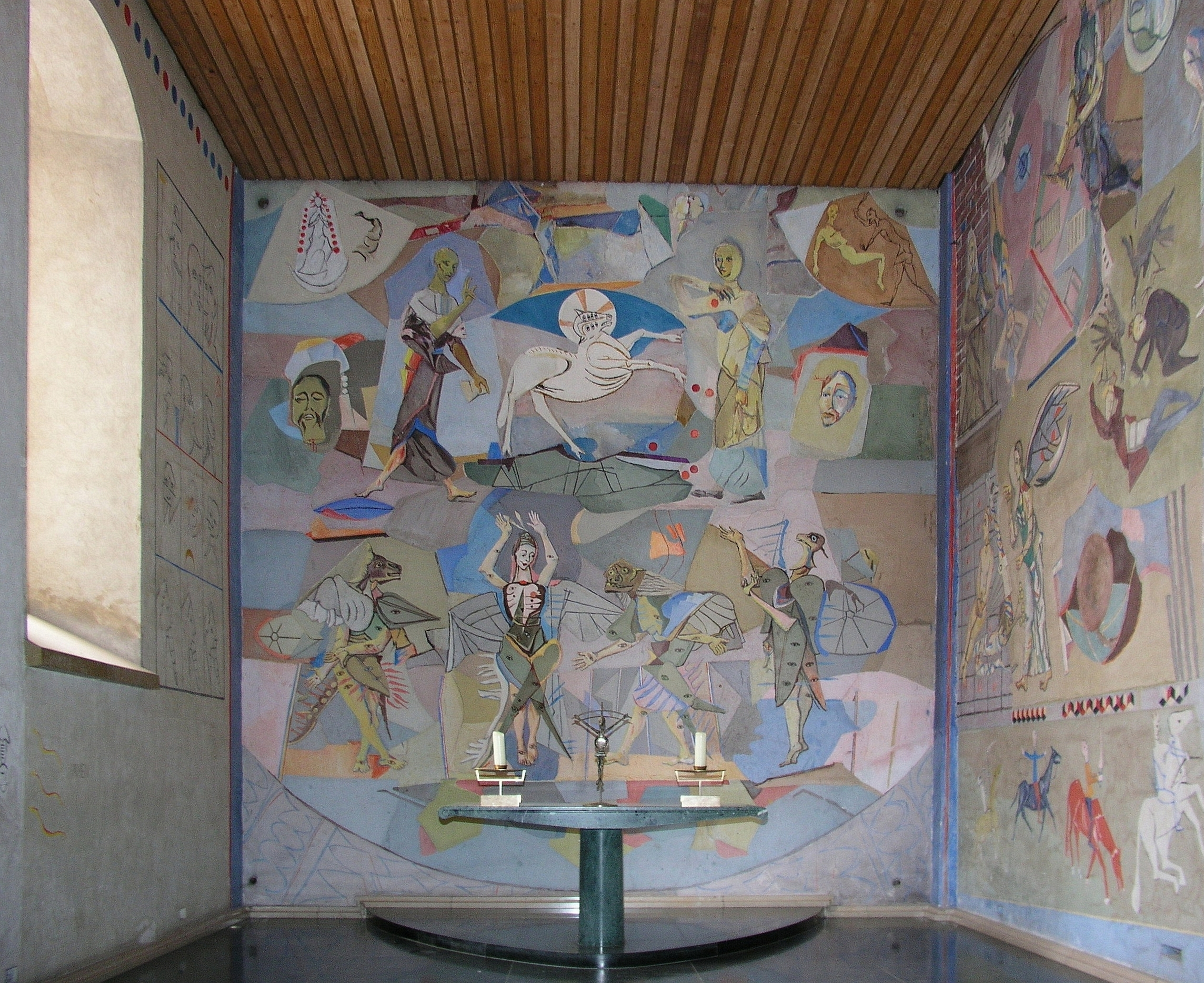 Basilika Seckau, Engelskapelle, Fresko "Seckauer Apokalypse" von Herbert Boeckl, 1952-1960, Altarwand